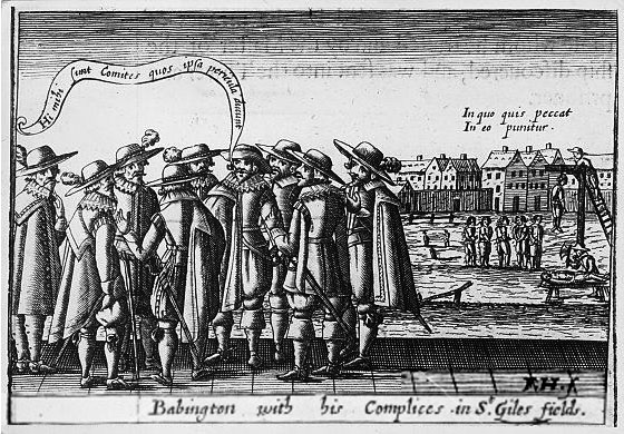 Stampa del XVI secolo che raffigura i congiurati del complotto Babington